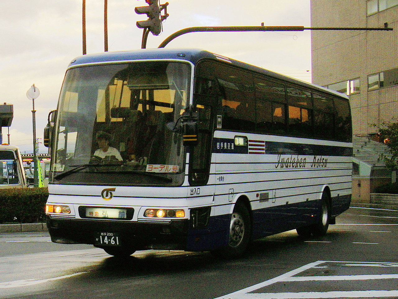 "Jodel gō" Morioka to Hirosaki